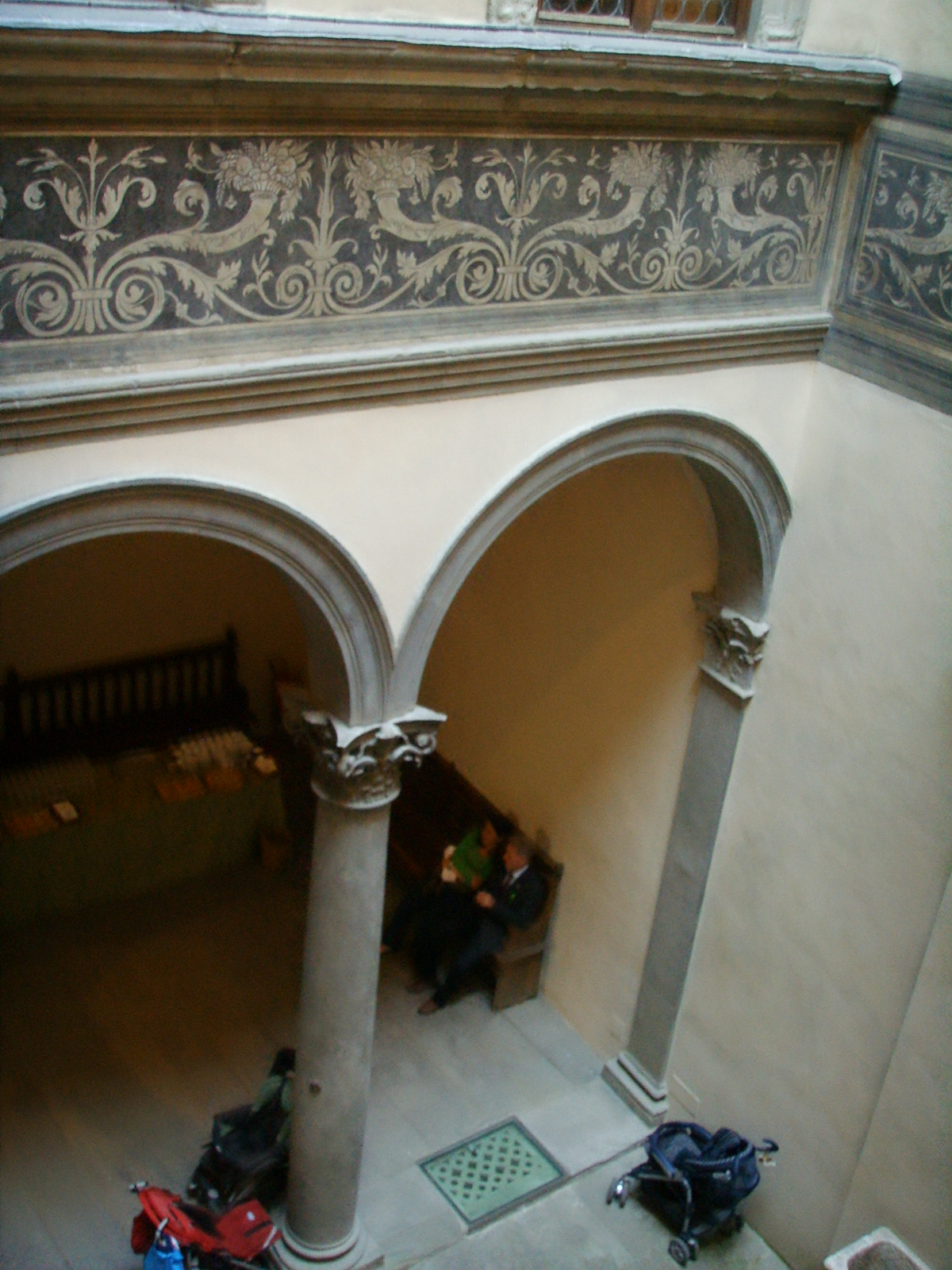 Palazzo corsi-horne, cortile